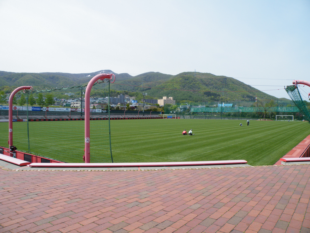 宮の沢白い恋人サッカー場 Miyanosawa "Shiroi-Koibito" Football Stadium 北海道札幌市西区宮の沢2条3丁目 Miyanosawa 2-jo 3-chome, Nishi-ku Sapporo, Hokkaido, Japan.